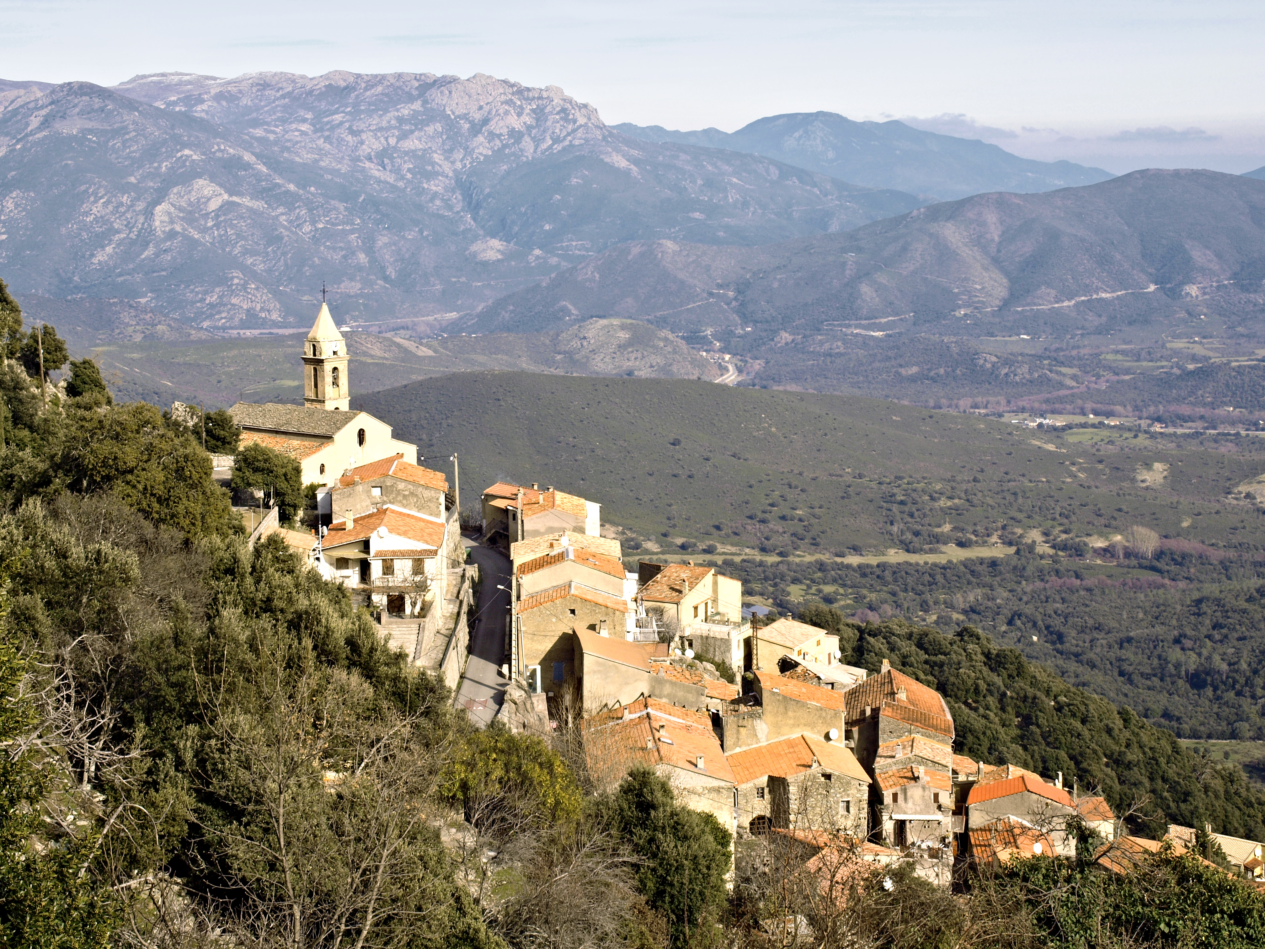 Prato-di-Giovellina (Corsica) - Le village vu du hameau de Prato Soprano